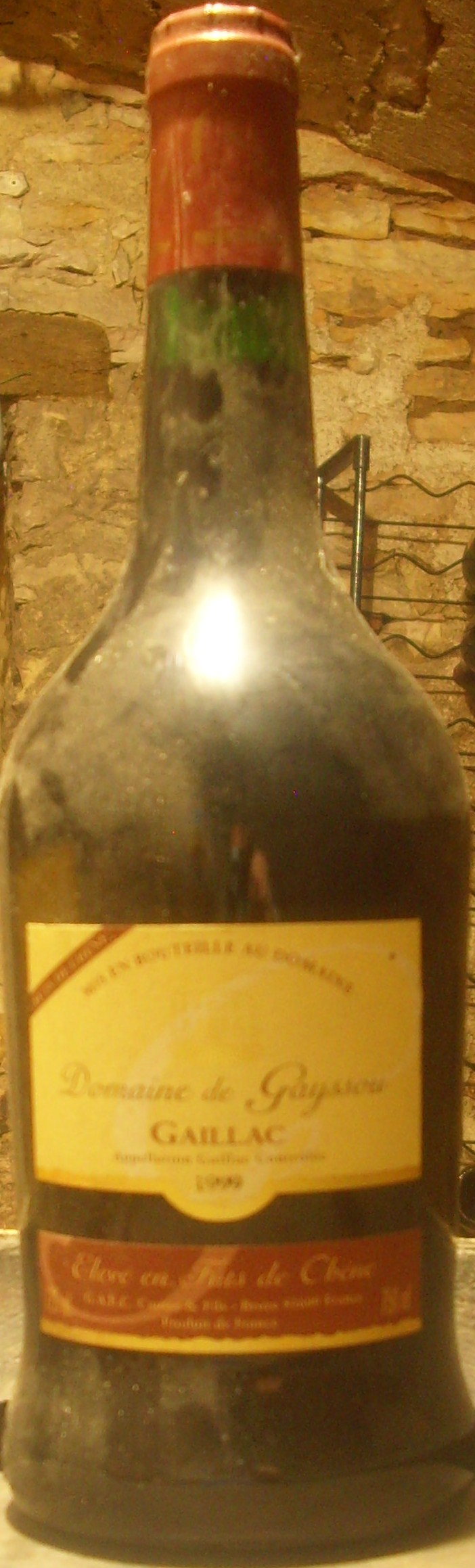 Eine Gaillacoise mit Rotwein Jahrgang 1999